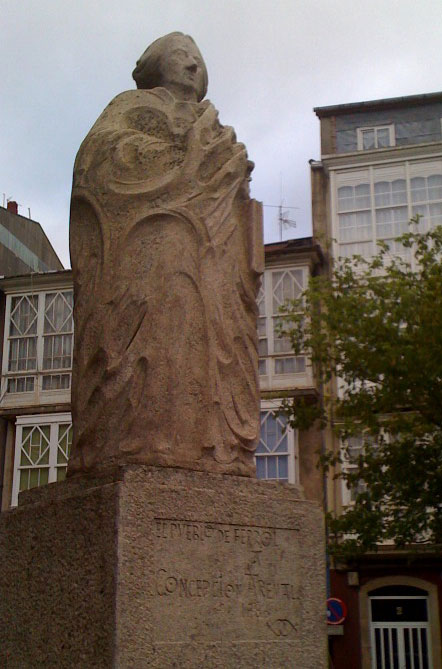 Monumento a Concepción Arenal no bairro de Esteiro, em Ferrol (Galiza)